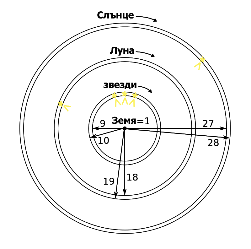 Космология на Анаксимандър